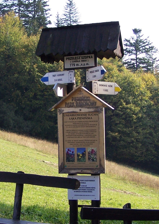 Przełęcz Szopka (Pieniny)